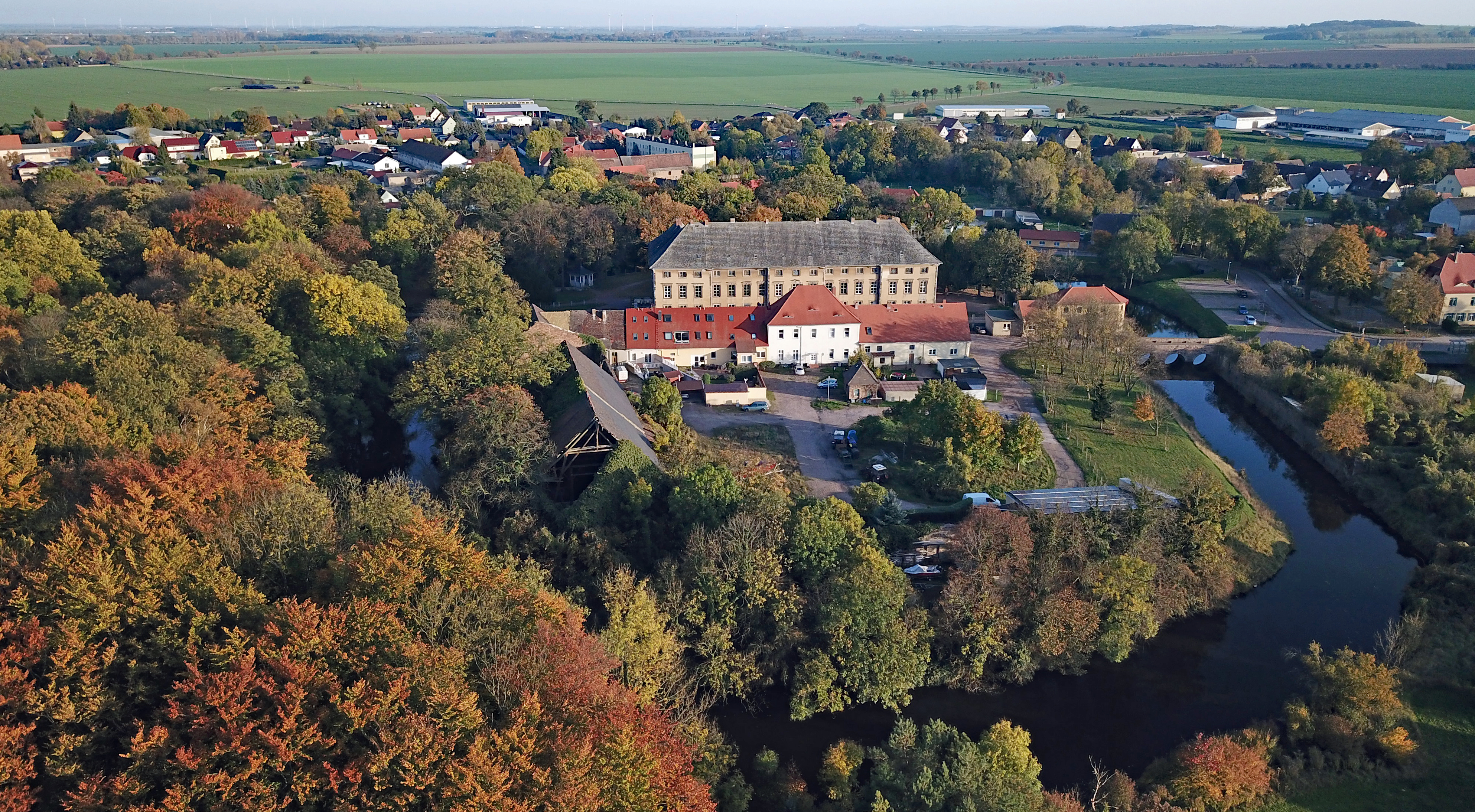 Schlossinsel Ostrau aus der Luft